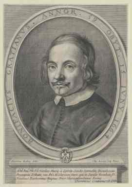 Graziani Bonifacio : Compositeur italien (Marino ? v. 1605 – Rome 1664).